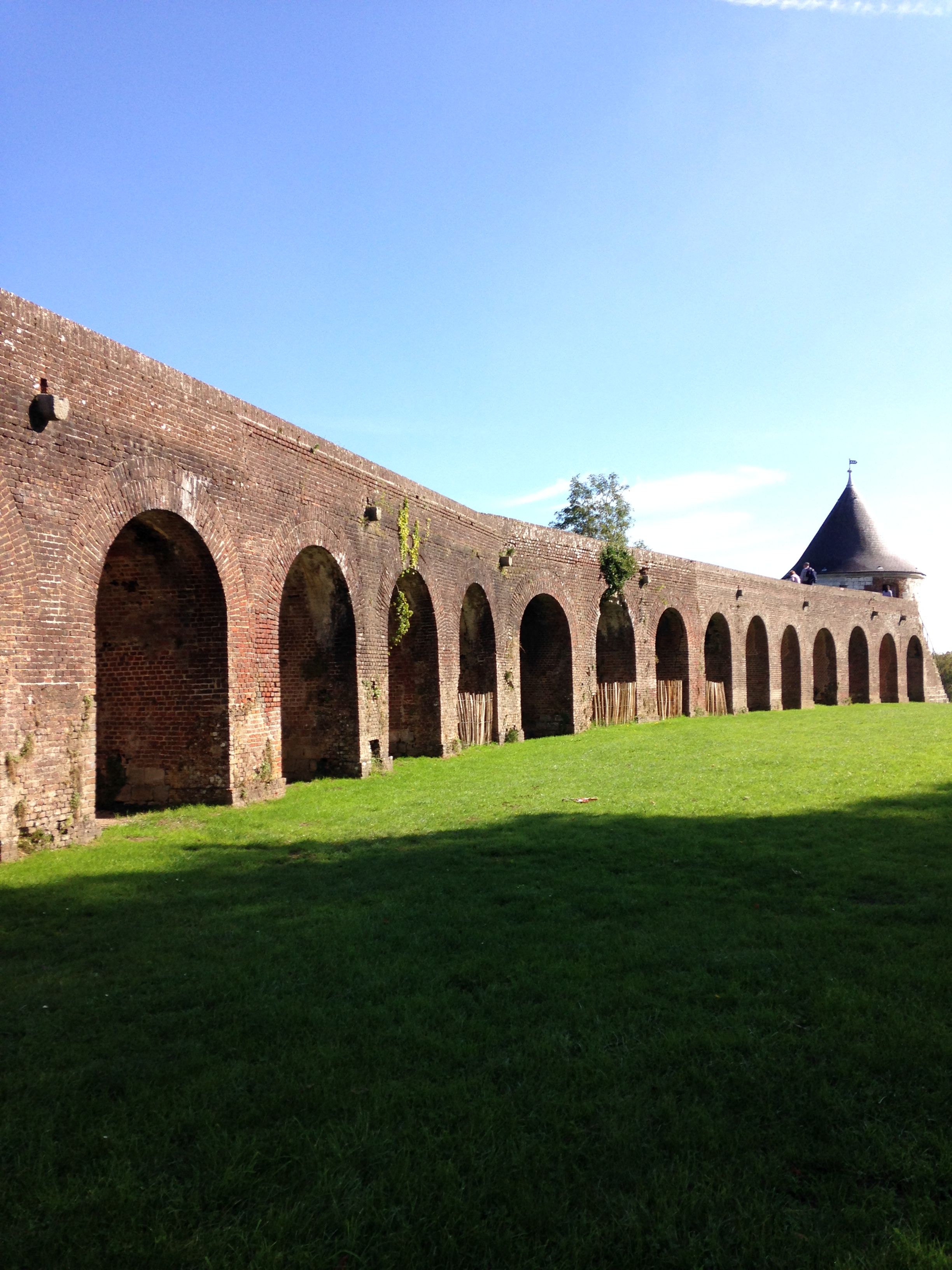 Chemin de ronde dans la citadelle de Montreuil sur Mer